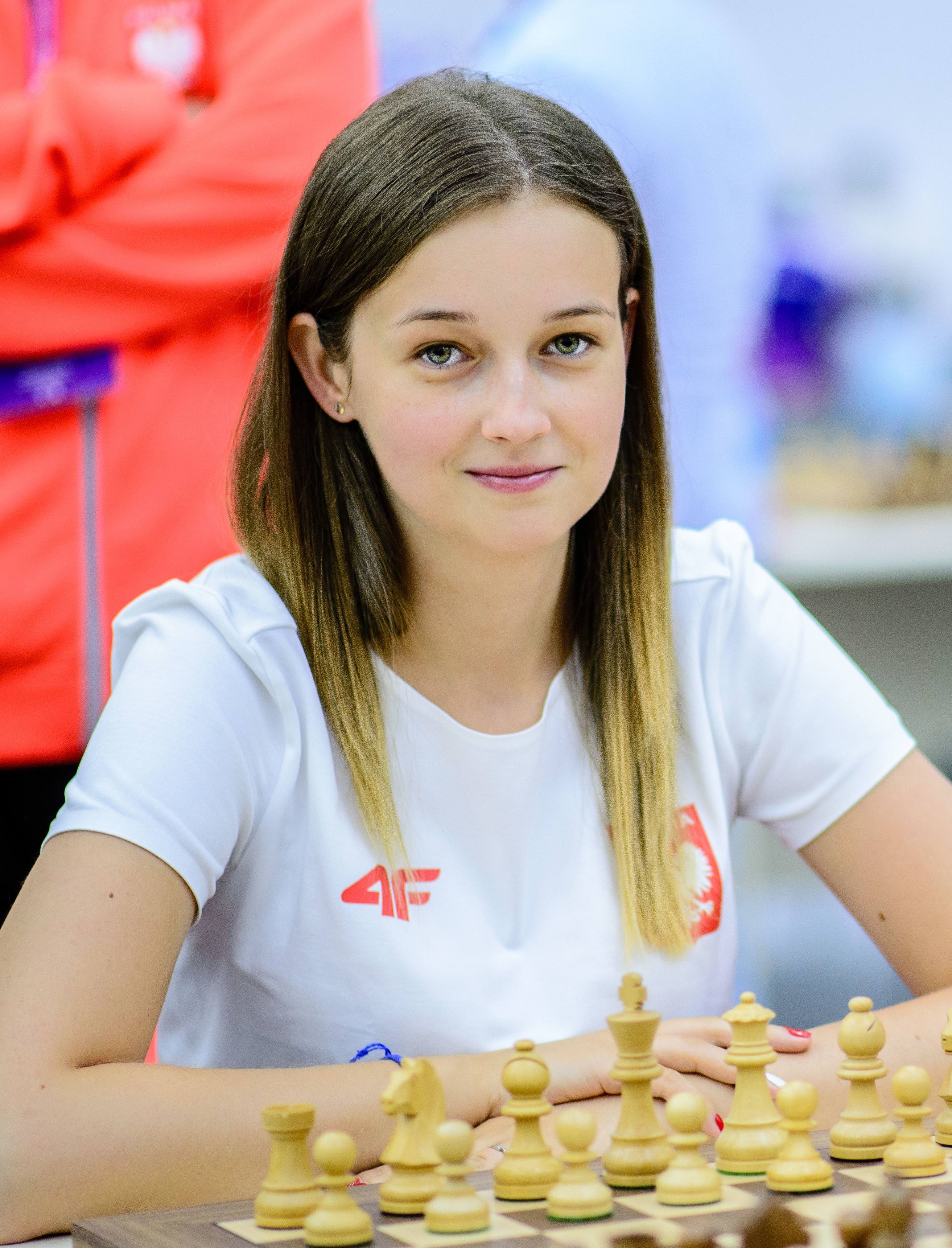 Szczepkowska Karina